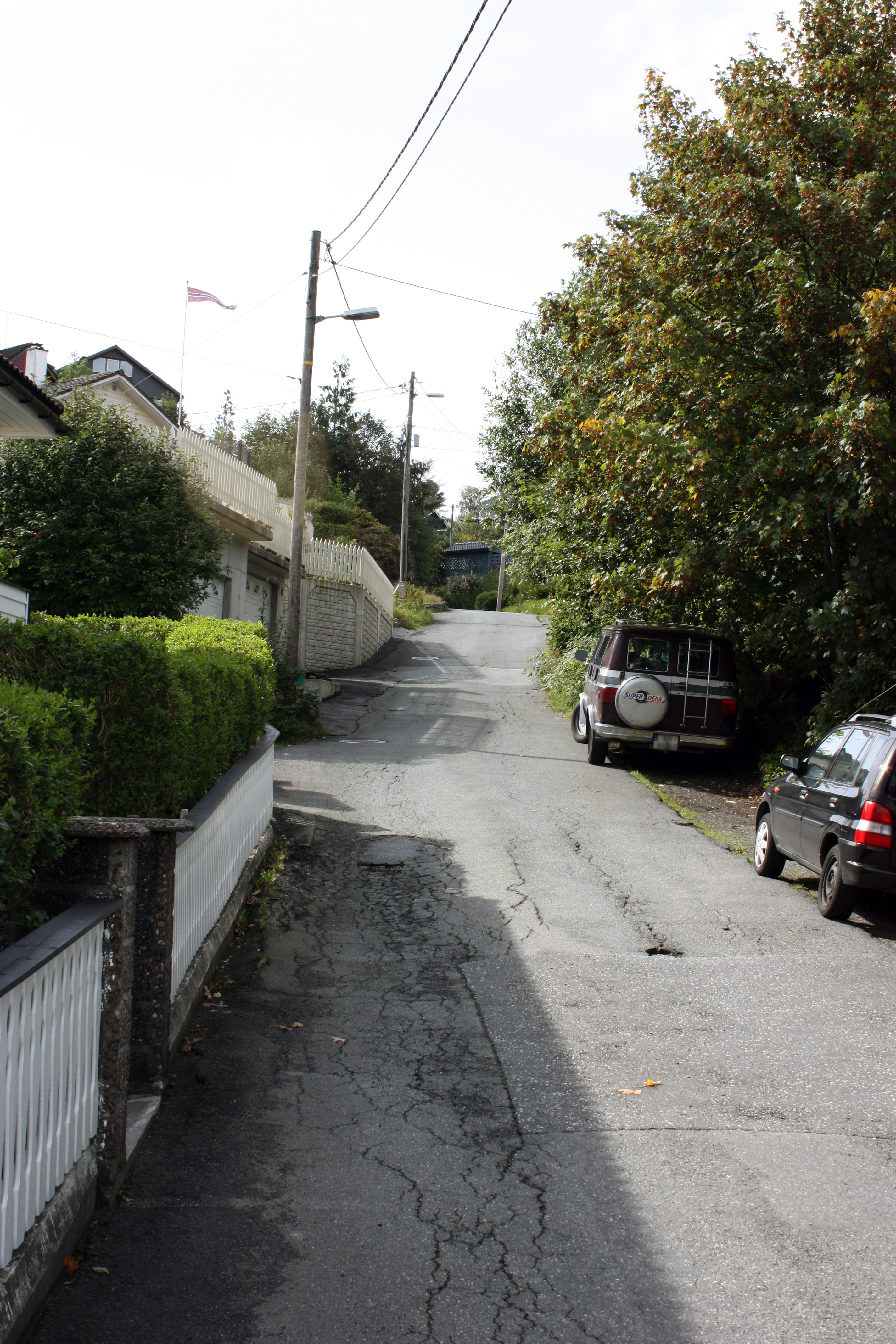 Gamle Kirkevegen, Fana, Bergen.